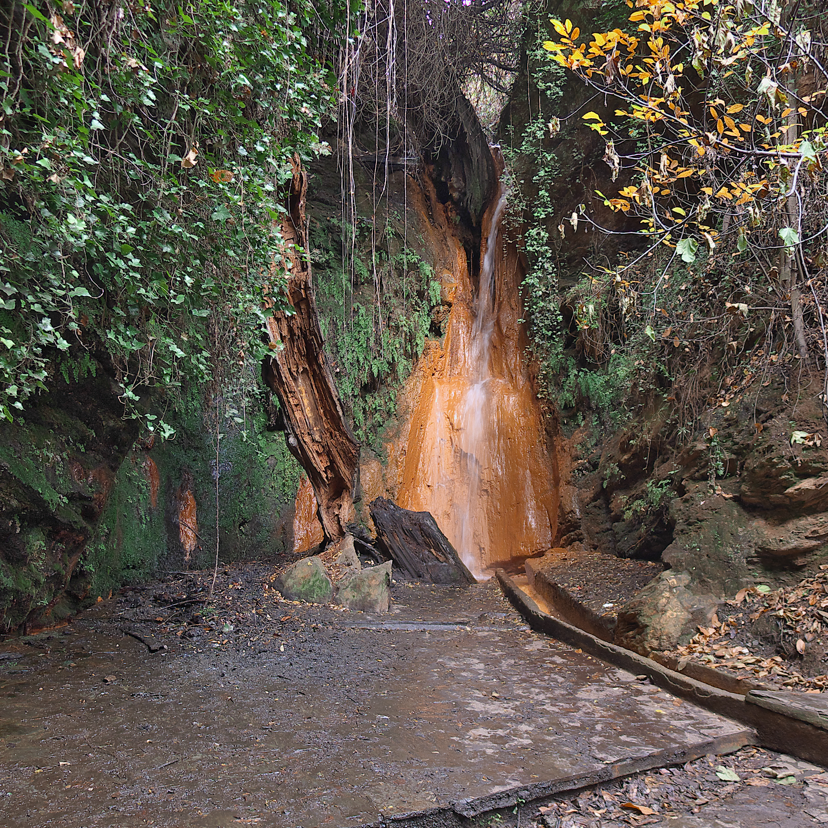 Manantial de aguas ferruginosas